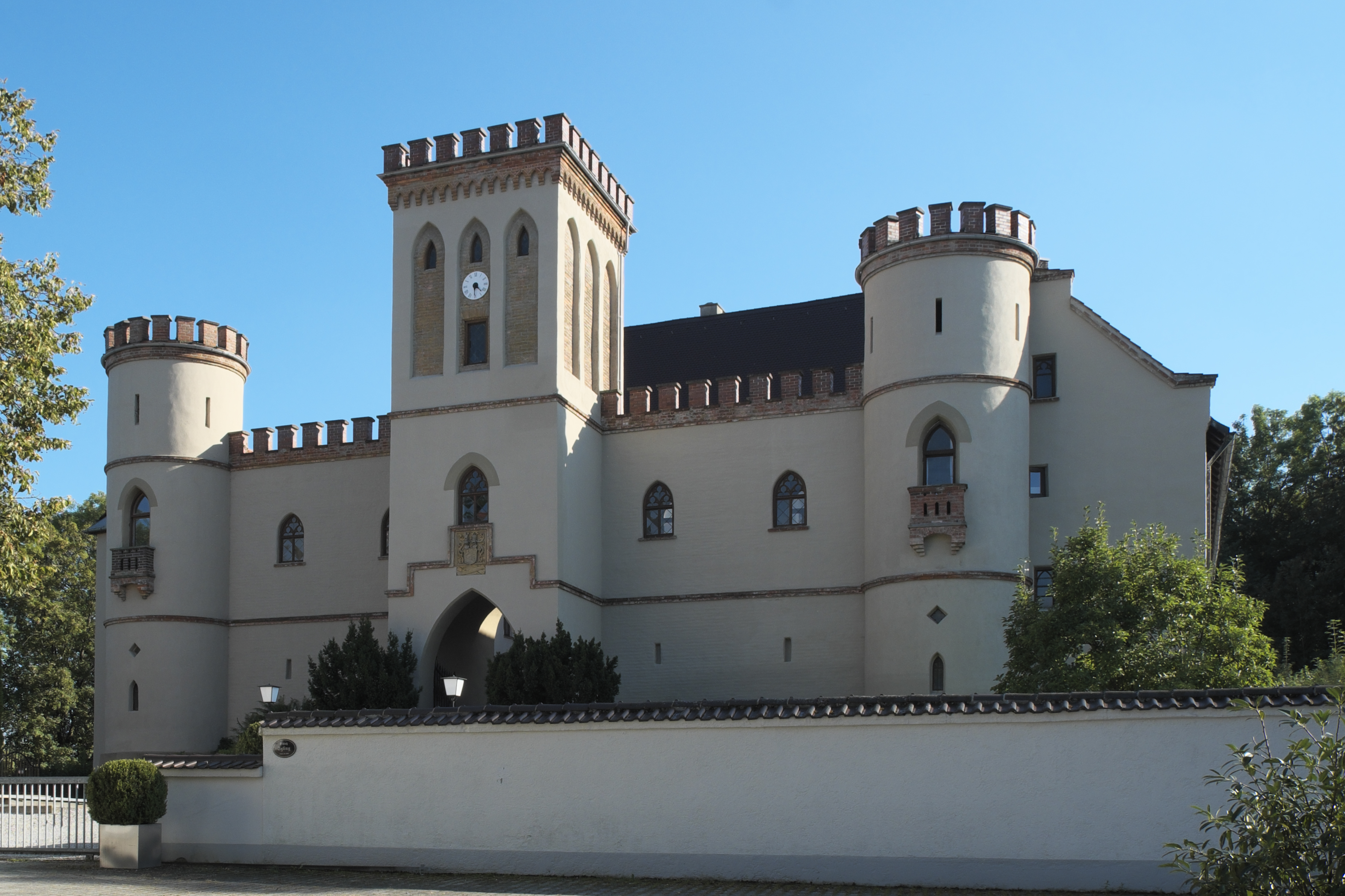 Schloss Igling in Igling im Landkreis Landsberg am Lech (Bayern/Deutschland)